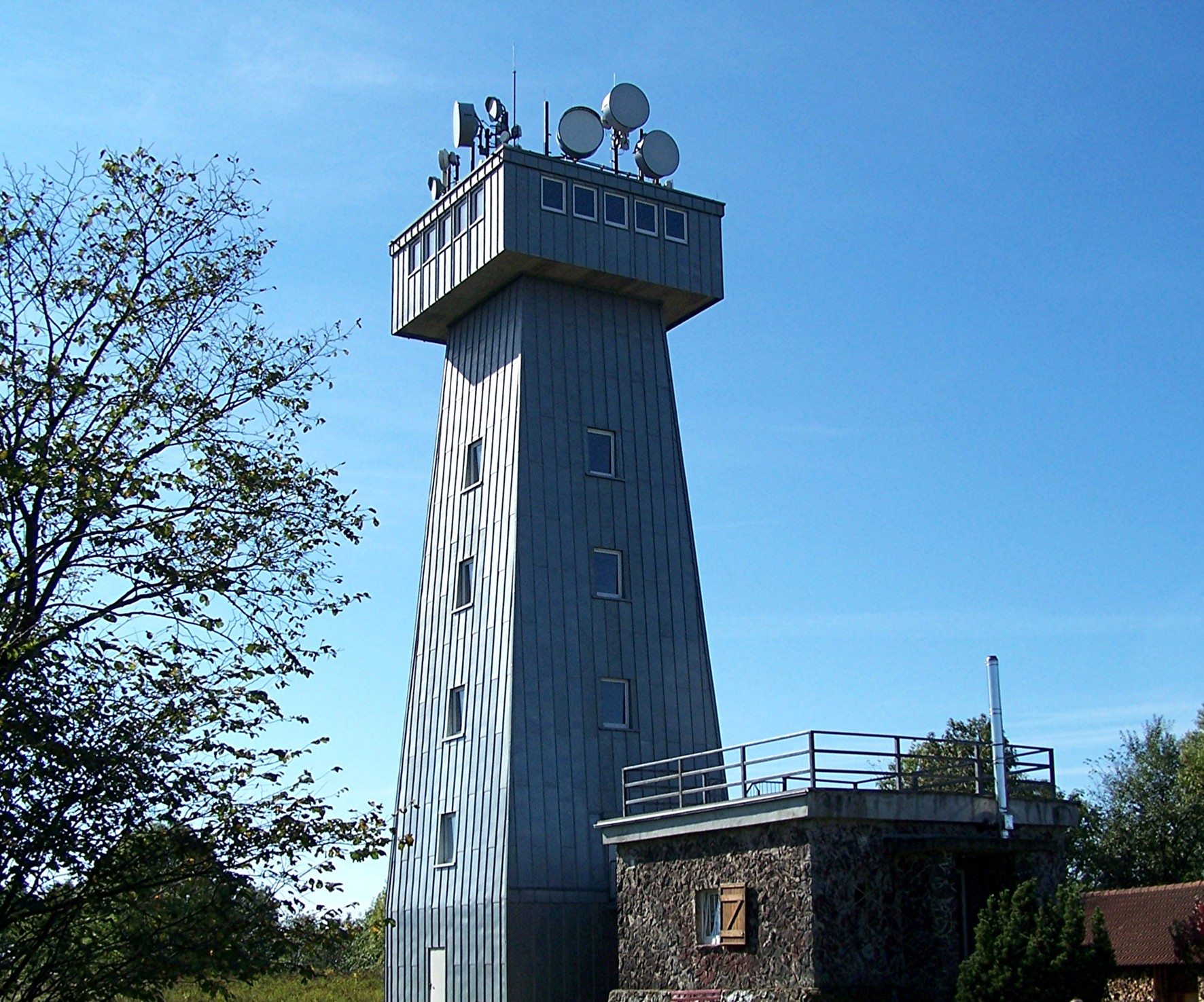 Der Aussichtsturm auf dem Pleßberg